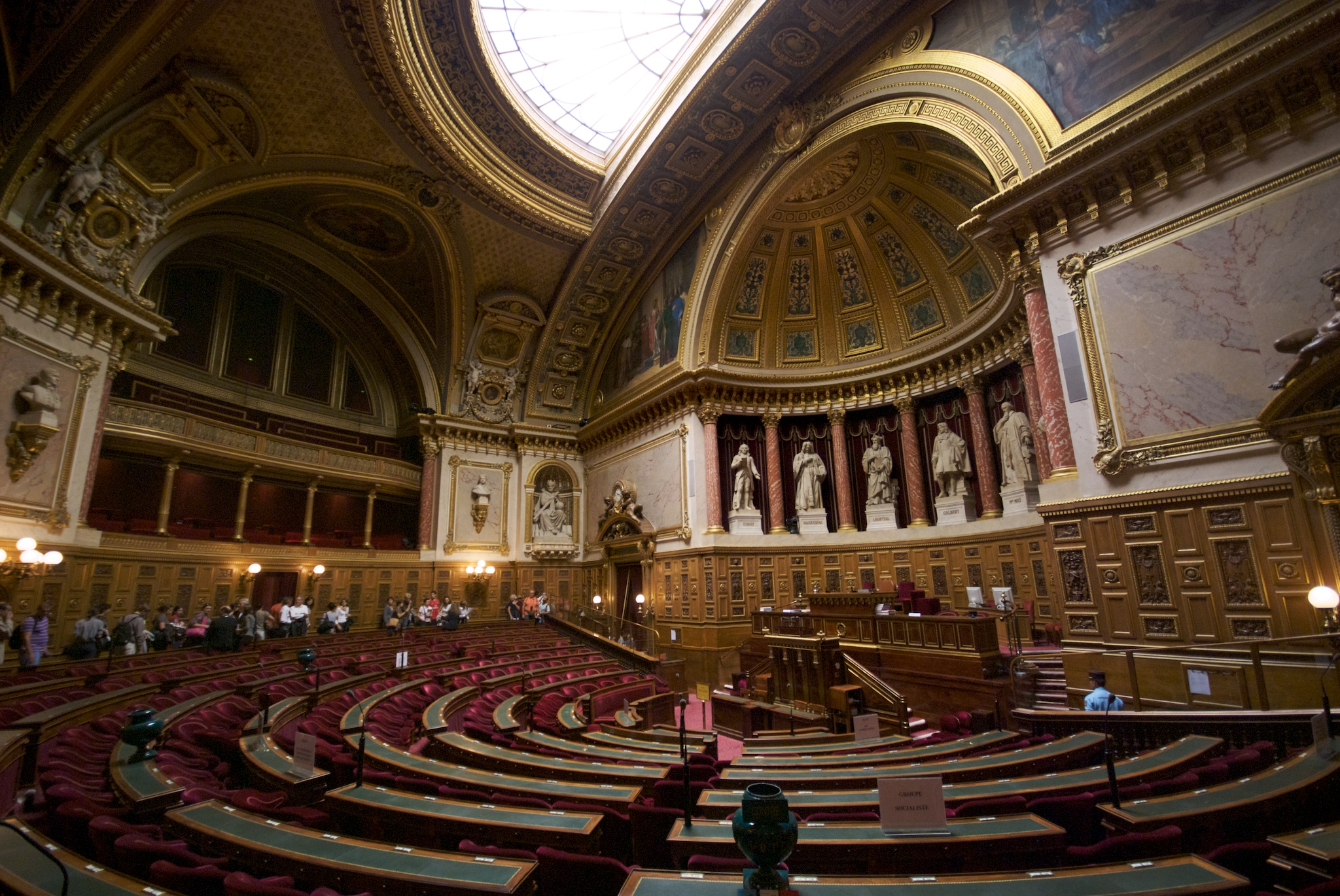 L'hémicycle du Sénat français en septembre 2009. Statues : Turgot Daguesseau Lhopital Colbert Molé